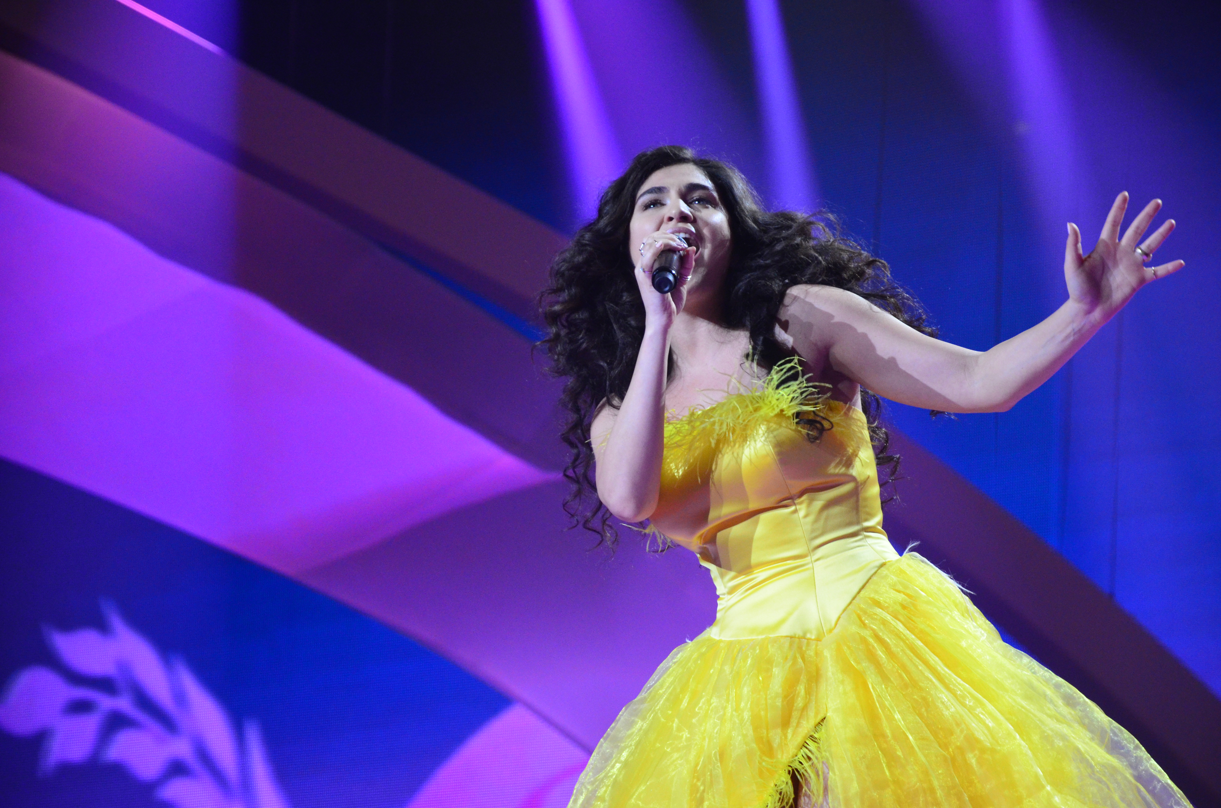 10 травня 2017 року у Києві відбулась генеральна репетиція 2 півфіналу "Євробачення".